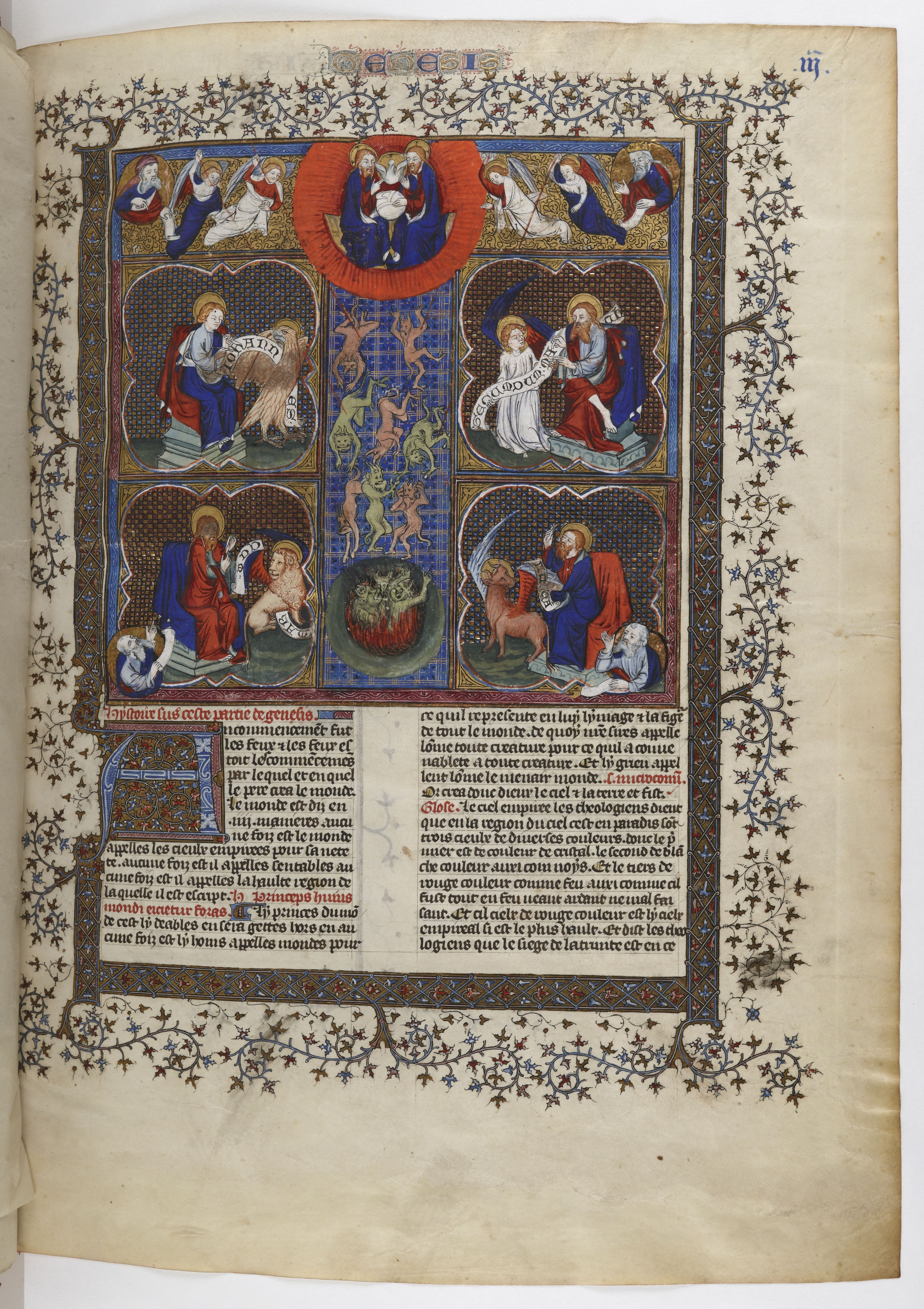 Grande Bible historiale complétée. Frontispice